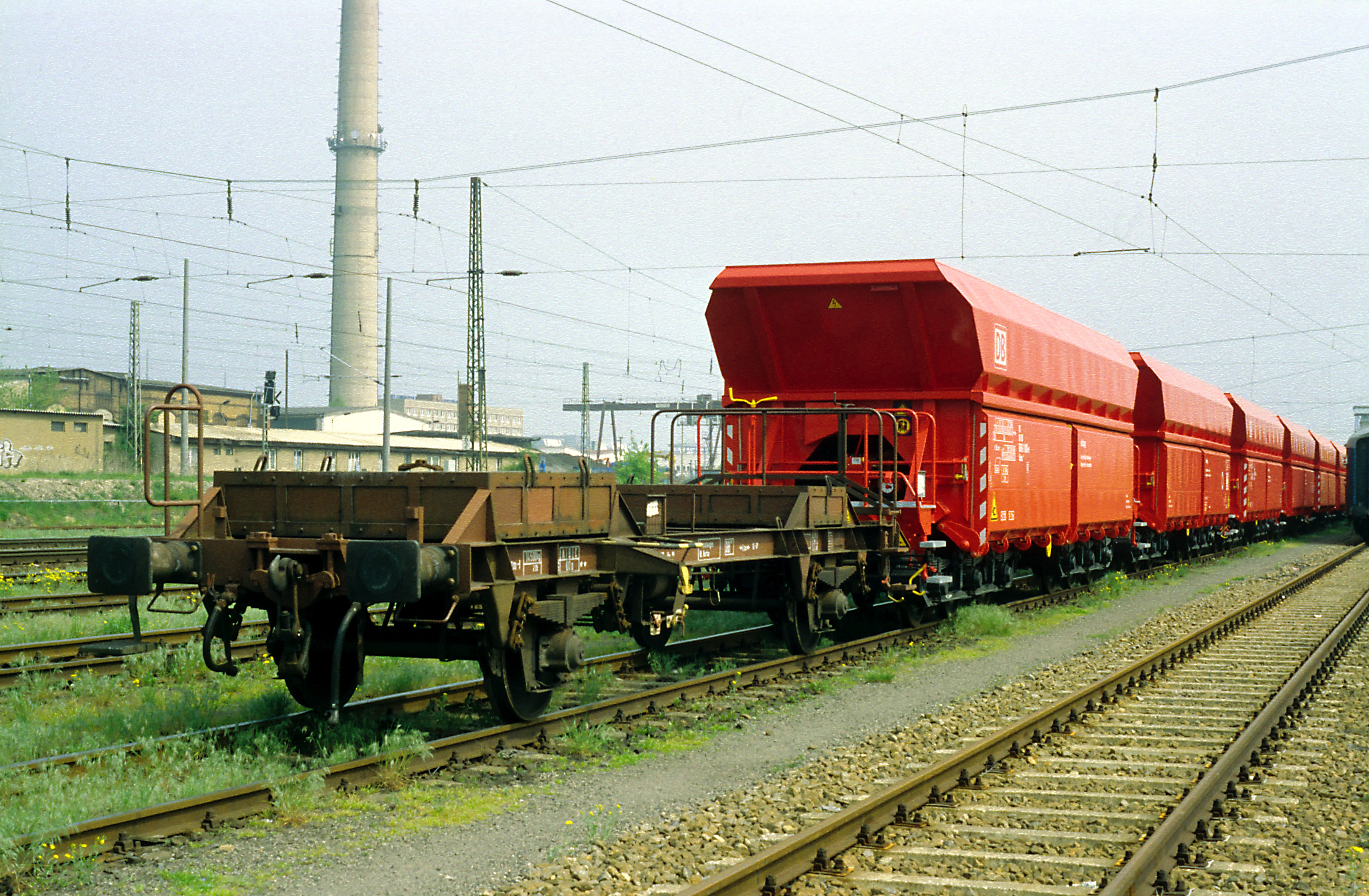 Neubau-Erzwagen mit Mittelpufferkupplung AK69e bei der Überführung vom Hersteller, mit ursprünglich für russische Wagen gebauten Kuppelwagen. Bf Engelsdorf